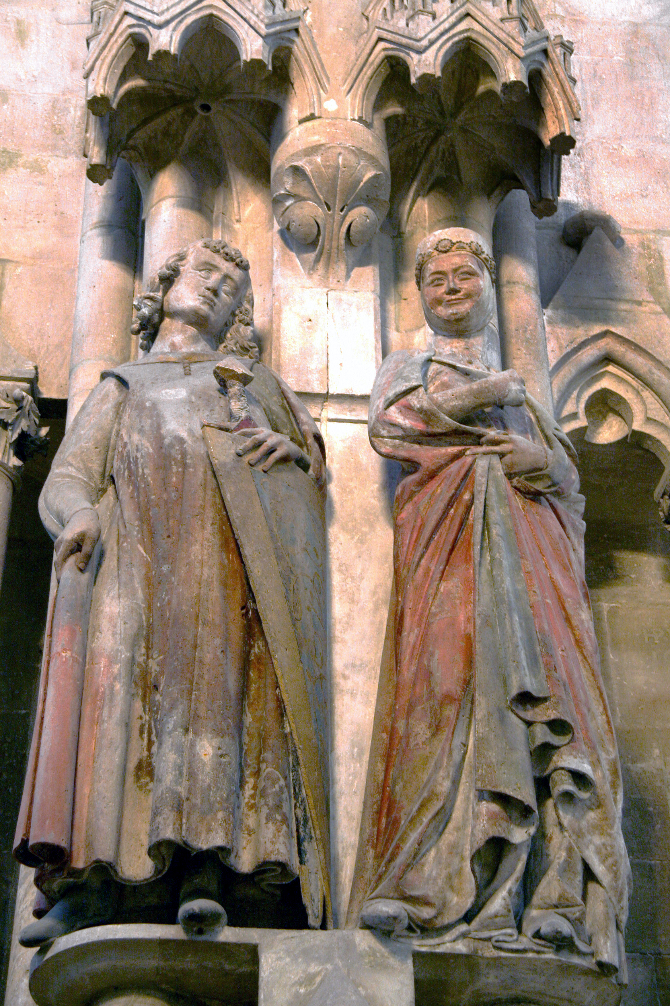 Hermann von Meißen und seine Frau Reglindis, Stifter des Naumburger Doms